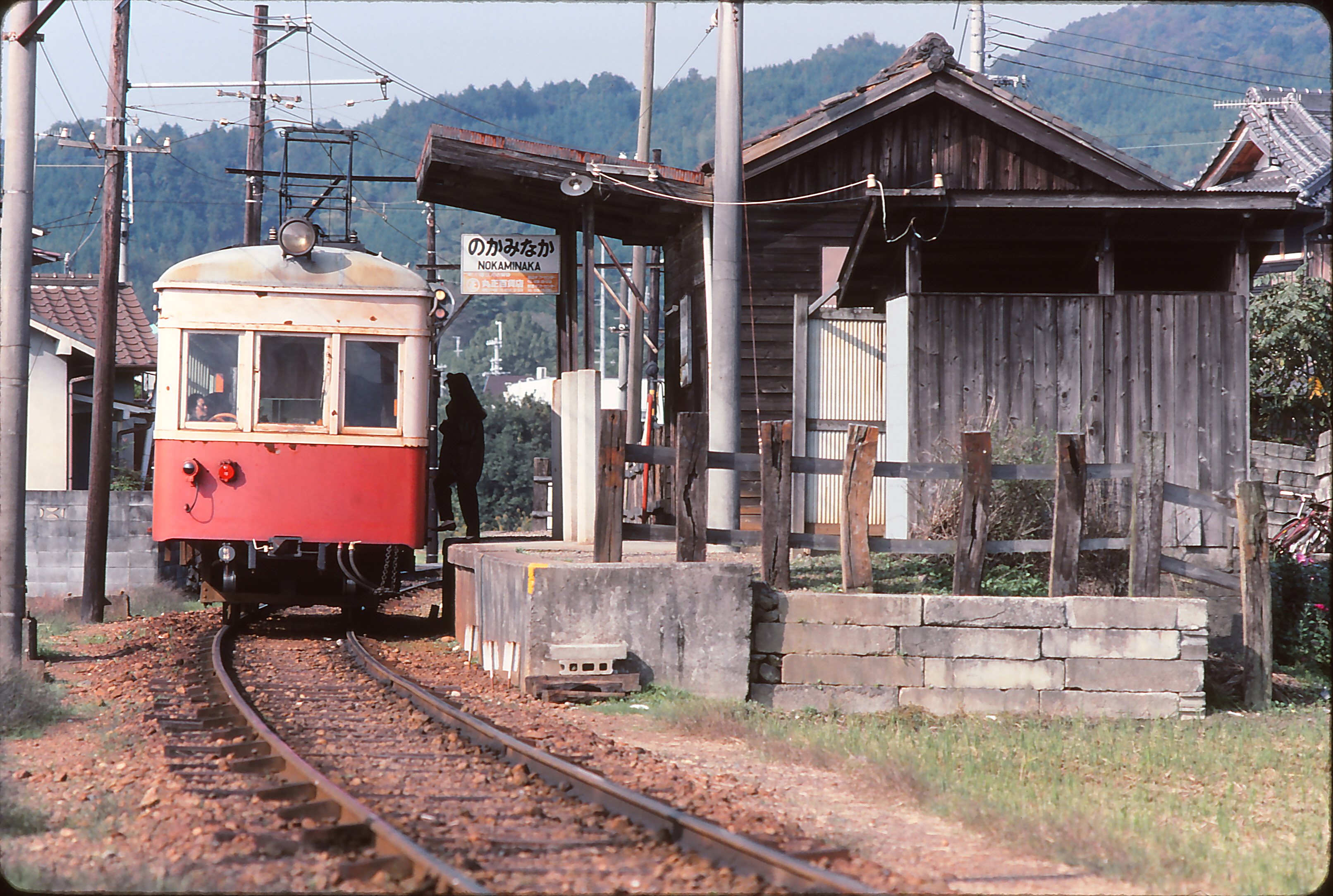 野上電気鉄道 野上中駅 デ10形